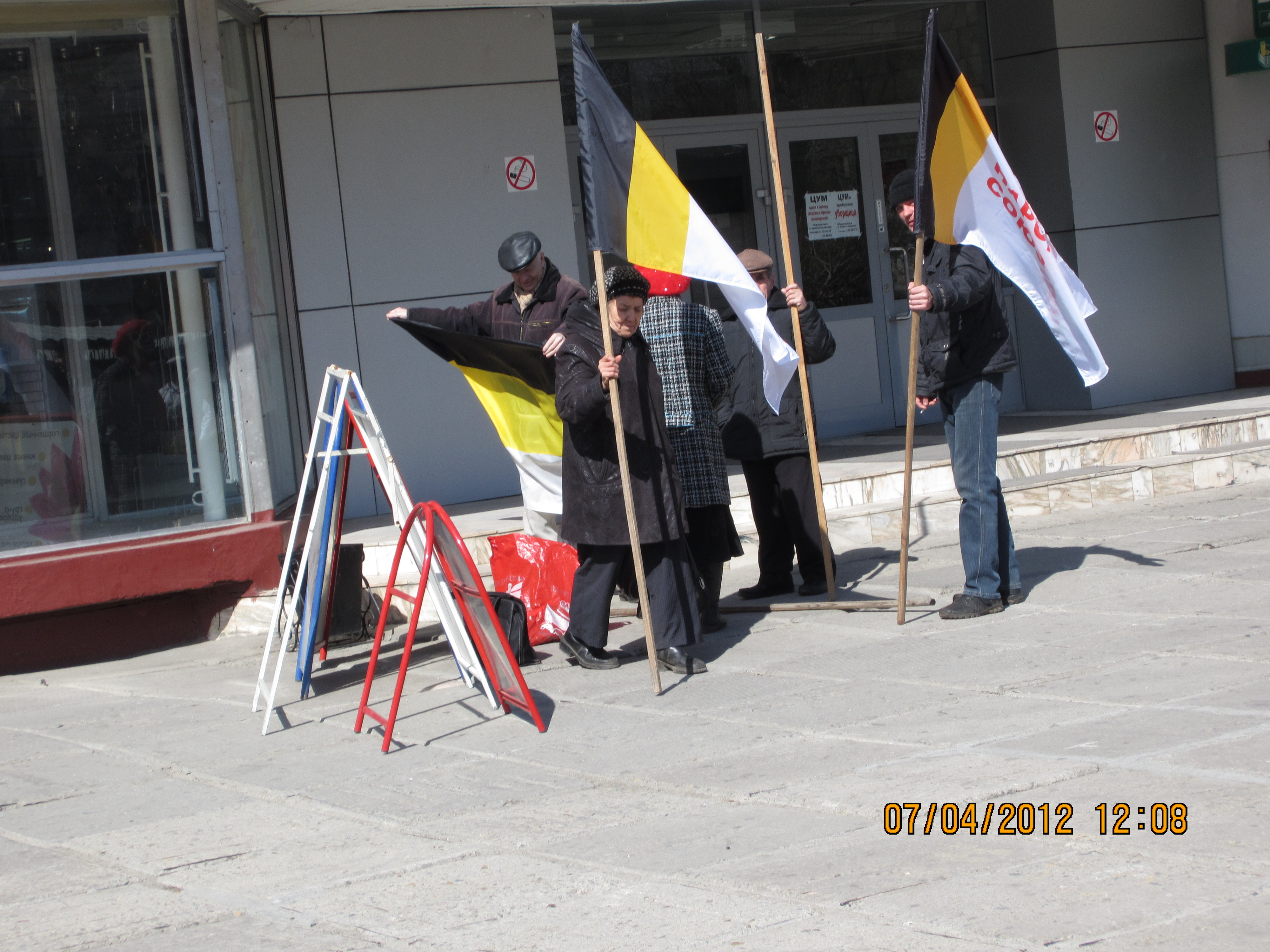 Народный Союз на подготовке совместного митинга с КПРФ 7 апреля 2012 года в Благовещенске